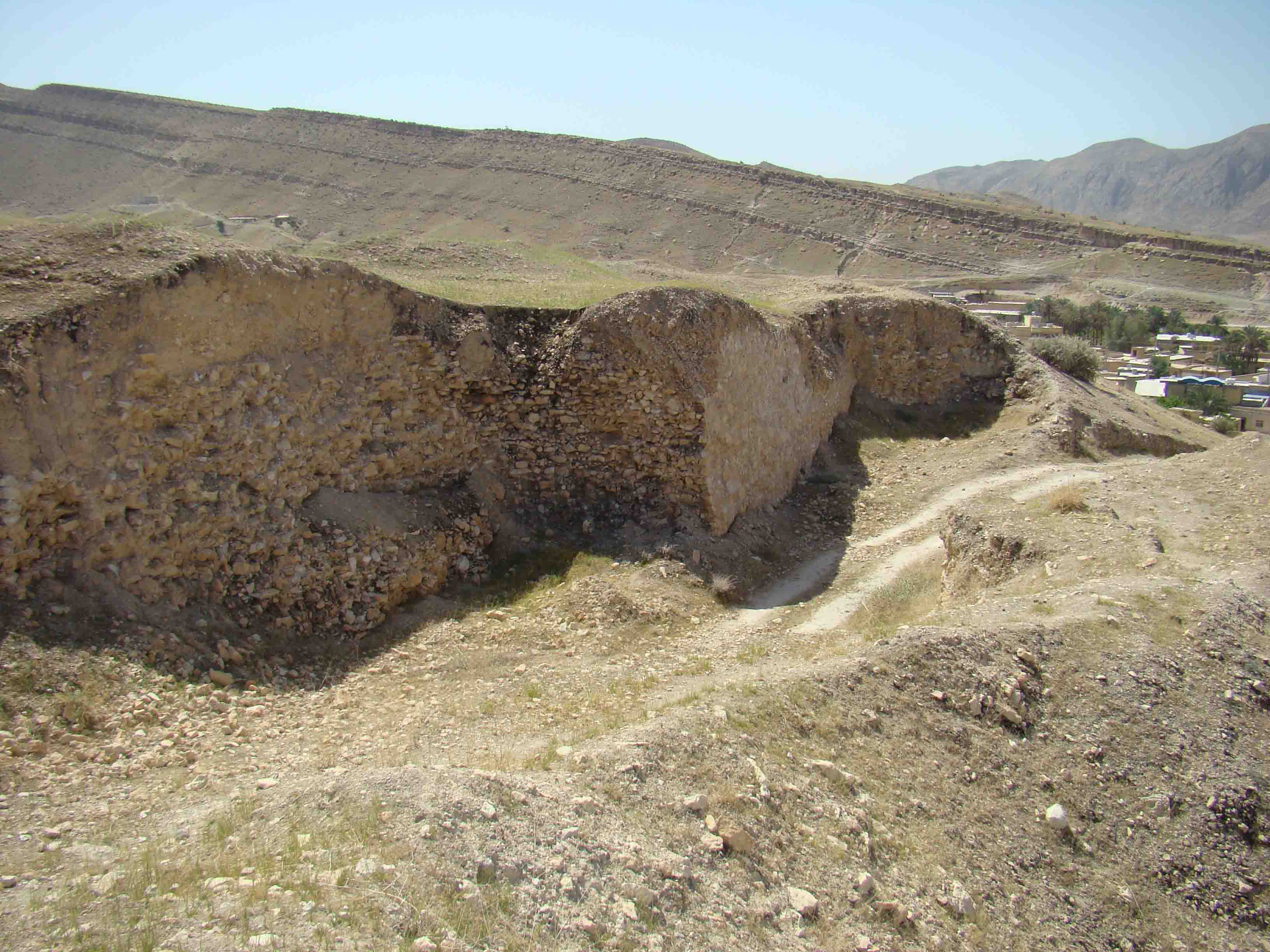 قلعه شاه نشين